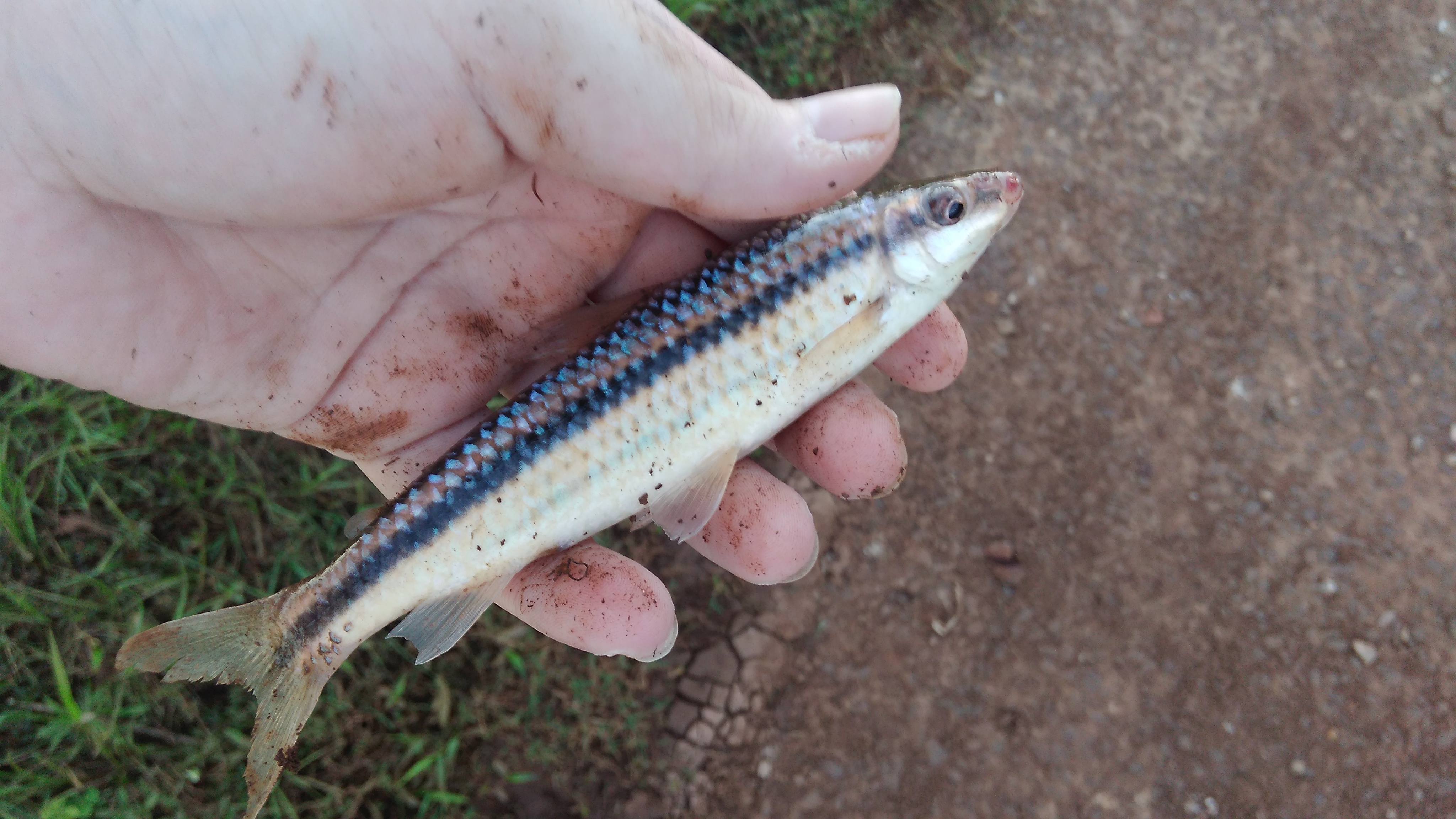 El pez en cuestión fue recolectado en la localidad de Yapeyú provincia de Corrientes Argentina en el río Uruguay medio.